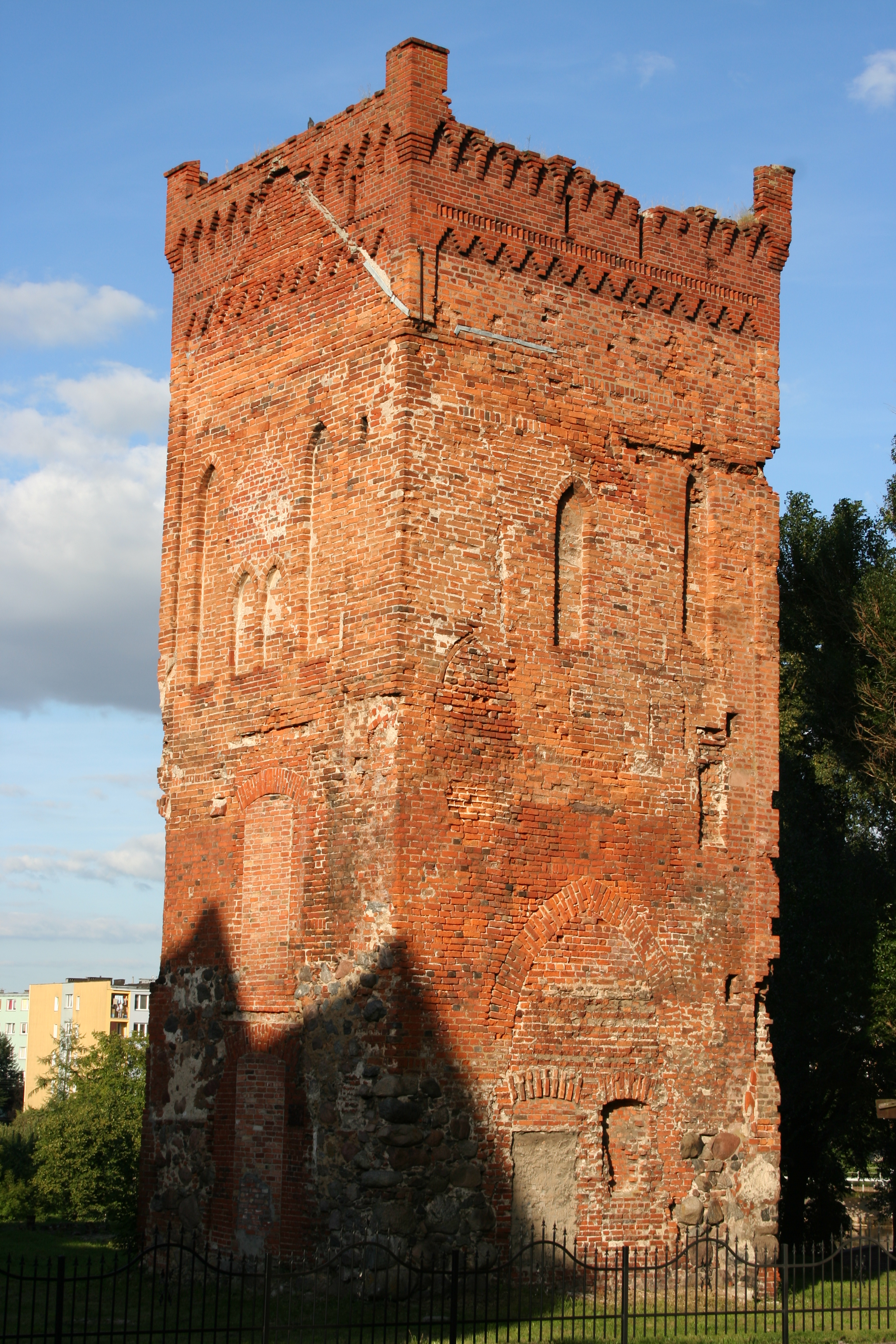 Wieża Bramna zamku biskupów warmińskich w Braniewie, XIV w.